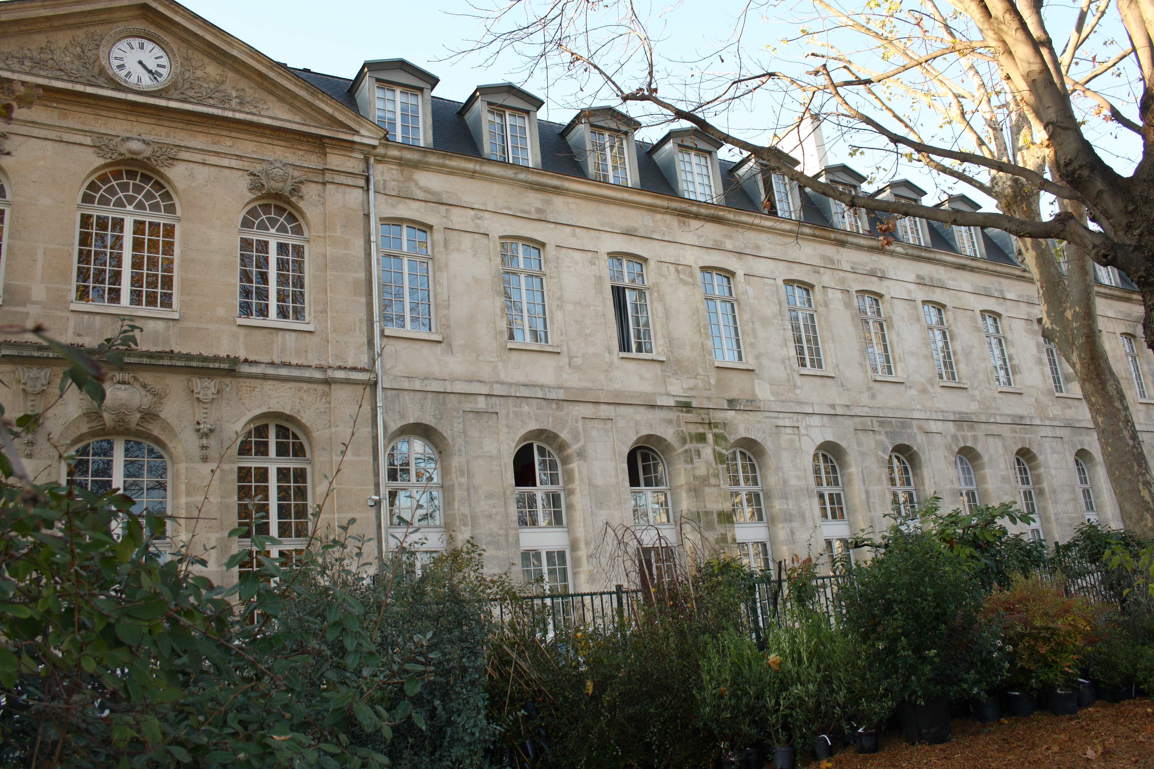 Ehemaliges Rekollektenkloster Couvent des Récollets im 10. Arrondissement von Paris